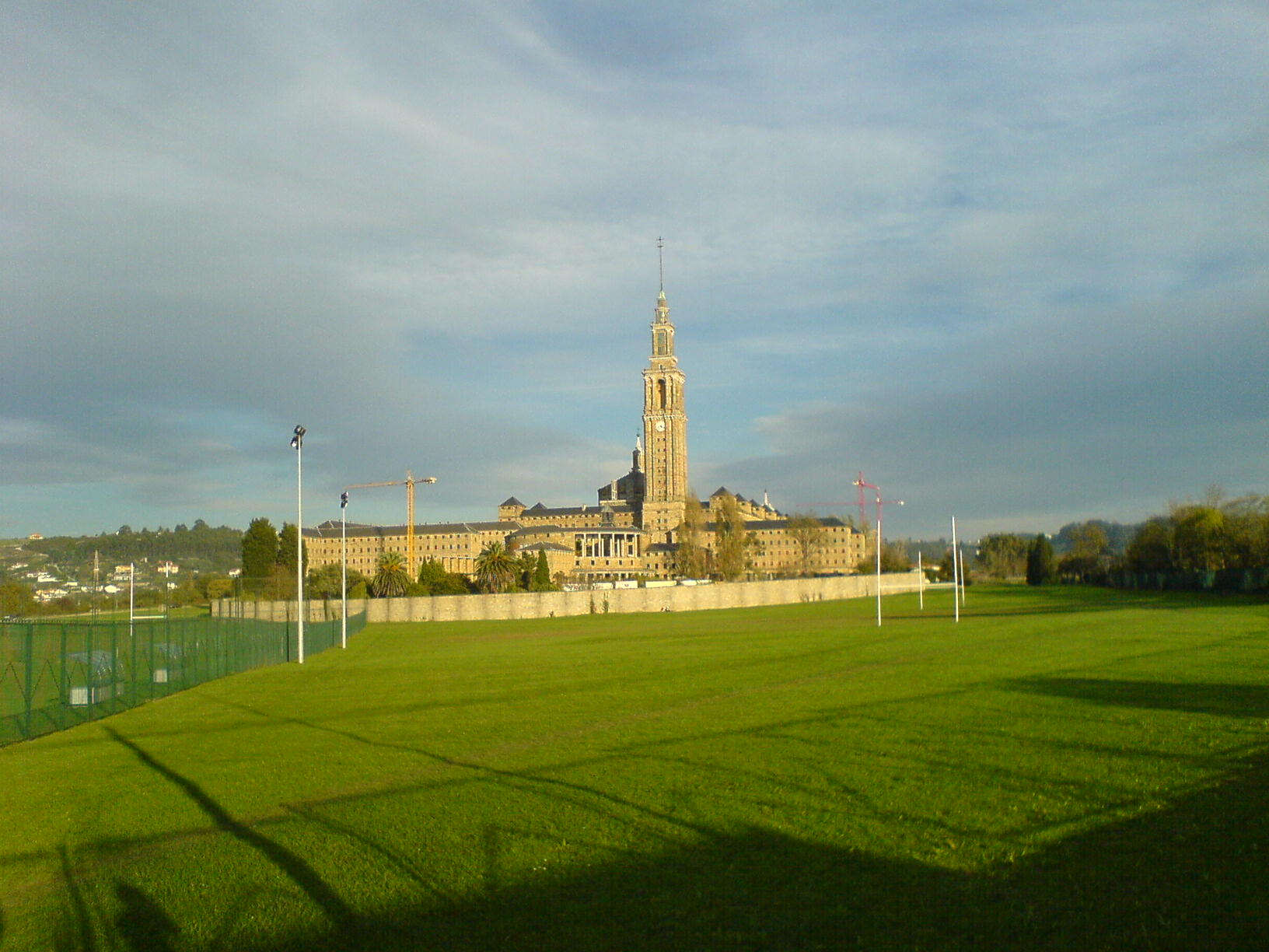 Imagen de la Universidad Laboral de Gijón, España / Image of the Universidad Laboral de Gijón, Spain